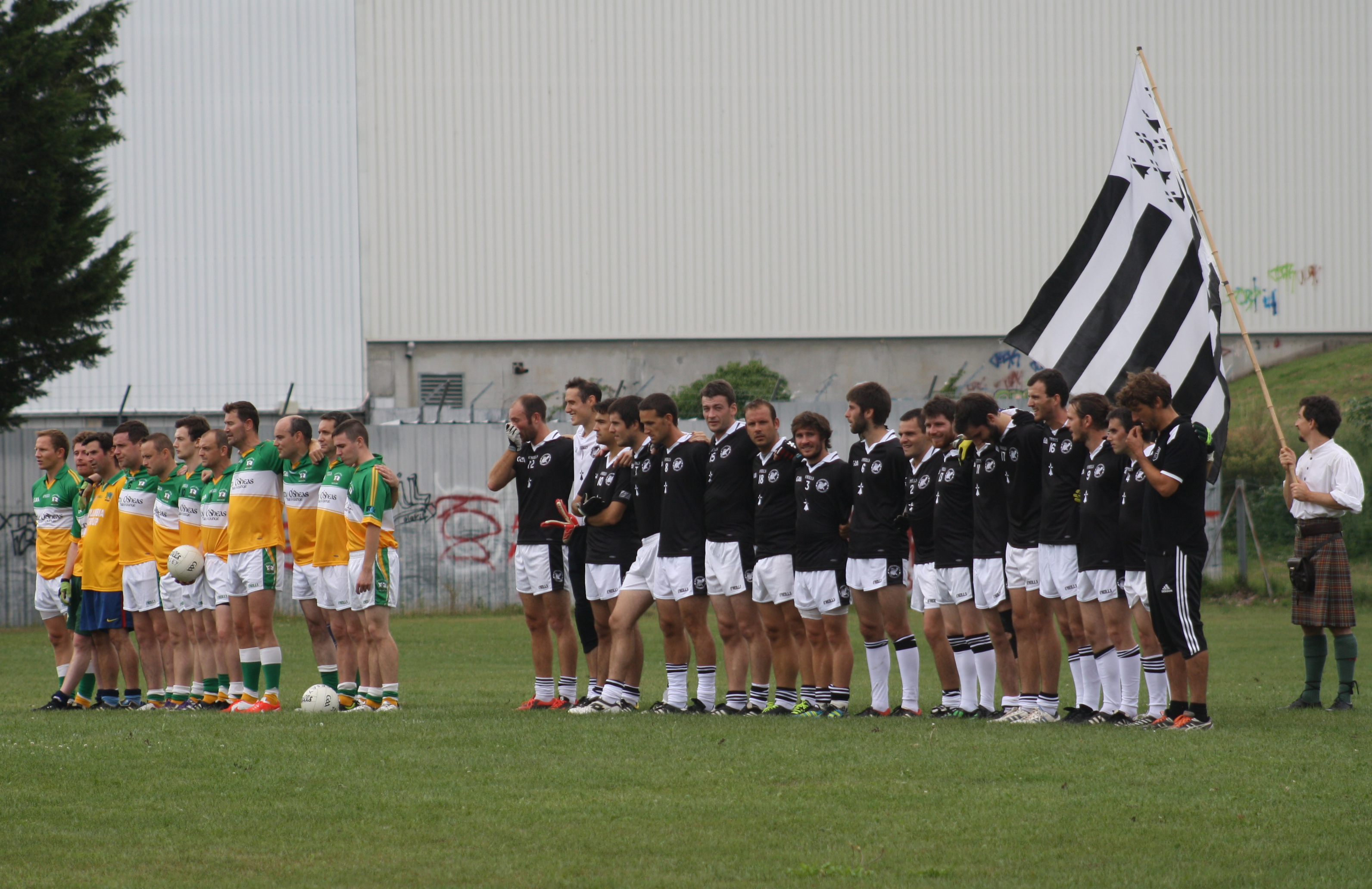 Match Bretagne-Jersey de football gaélique le 9 août 2014 à Lorient. Résultat 24 - 24